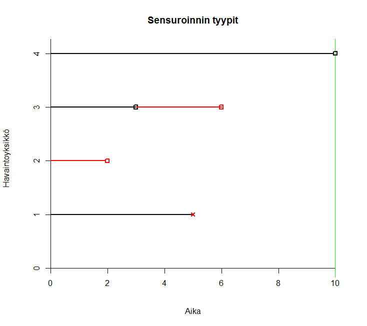 Sensuroinnin eri muodot elinaika-analyysissä